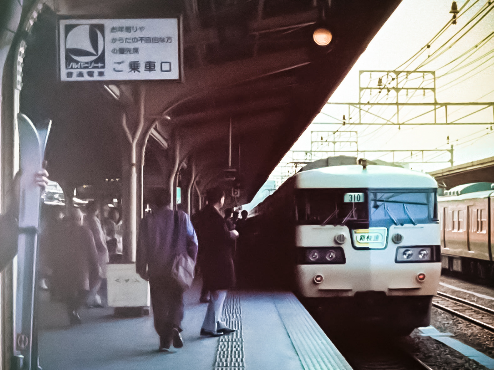 1984年の大阪駅 シルバーシートご乗車口の案内板がある